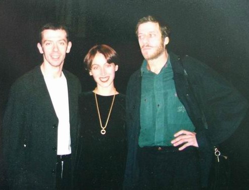 Балетмейстер Алексей Ратманский, его жена Татьяна и композитор Юрий Ханон на премьере балета "Средний Дуэт" (сцена Мариинского театра, Санкт-Петербург, 24 ноября 1998 года)